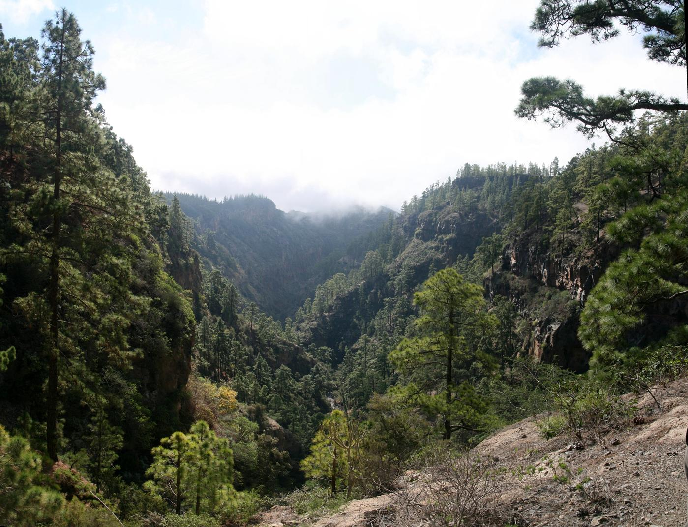 El cauce del Barranco del Infierno, conocido a esta altura como de la Fuente.